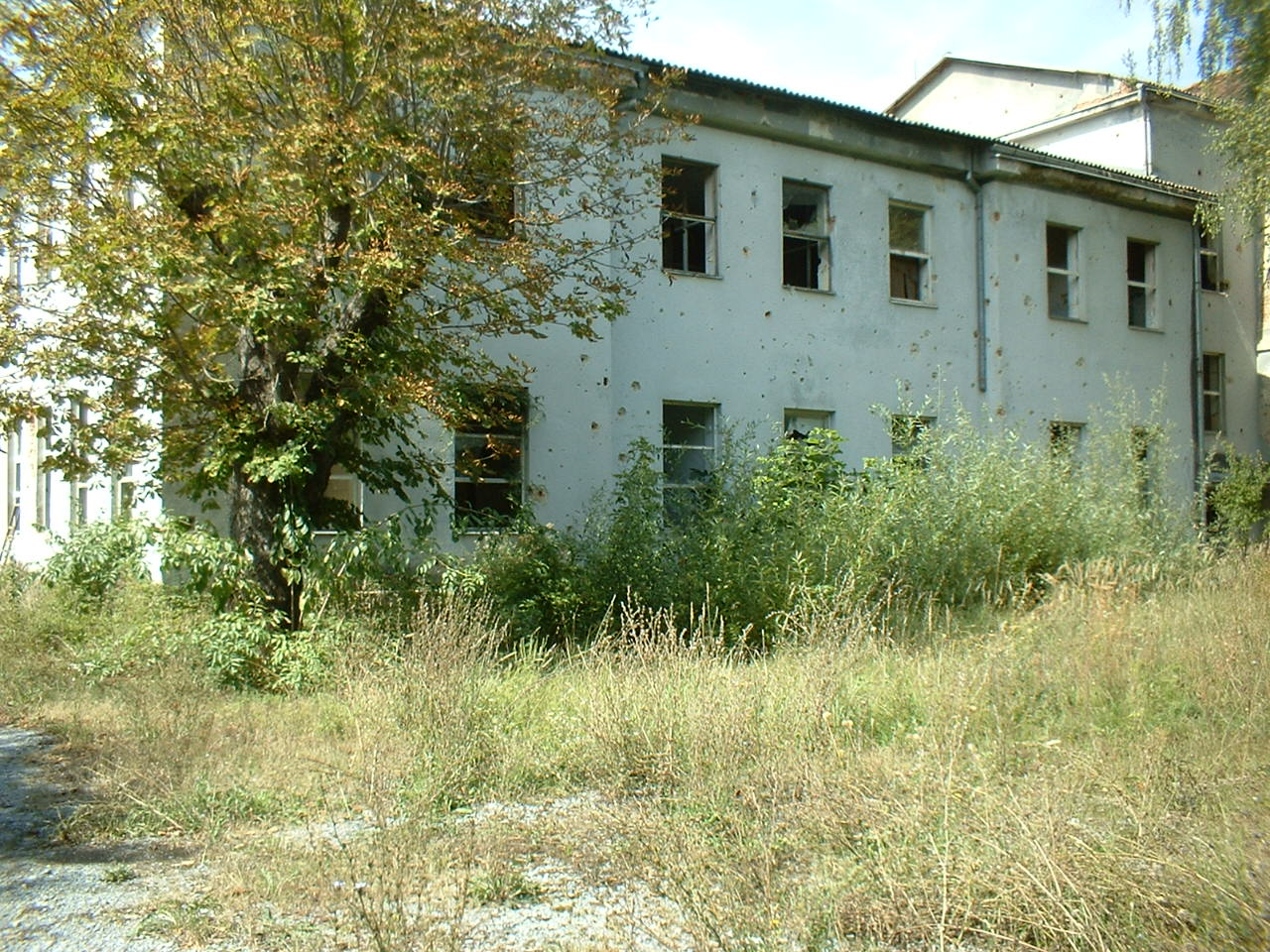 Pakrac. Hospital Psiquiátrico. Severamente dañado durante la Guerra de Croacia. Octubre 03.